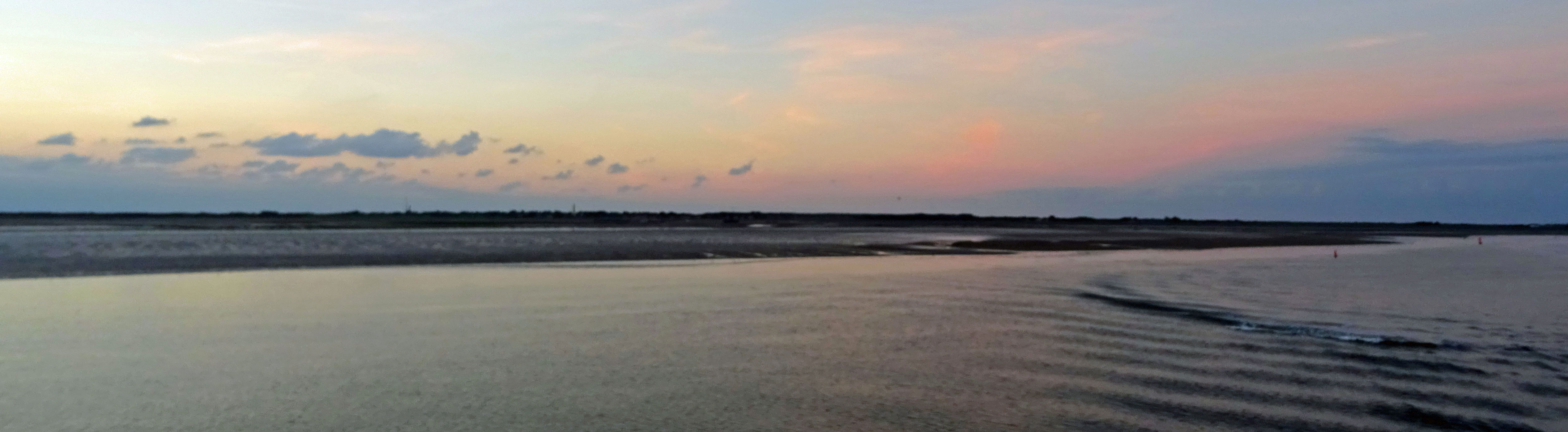 Schiermonnikoog bij avond